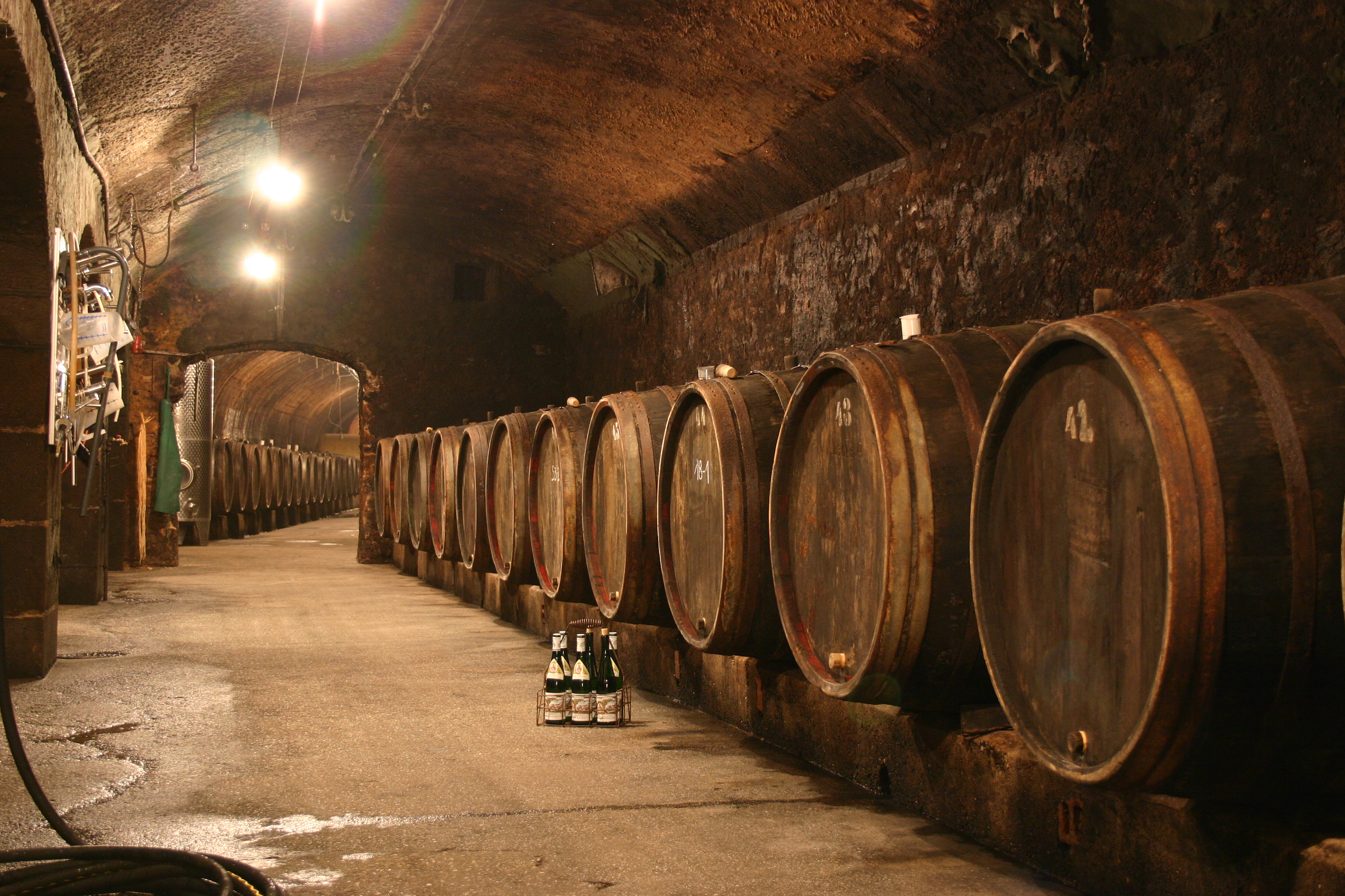 Fasskeller des Weinguts Maximin Grünhaus